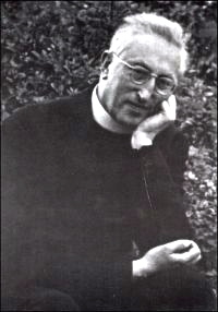 Portret fundatora kolegium Fawley Court, Anglia